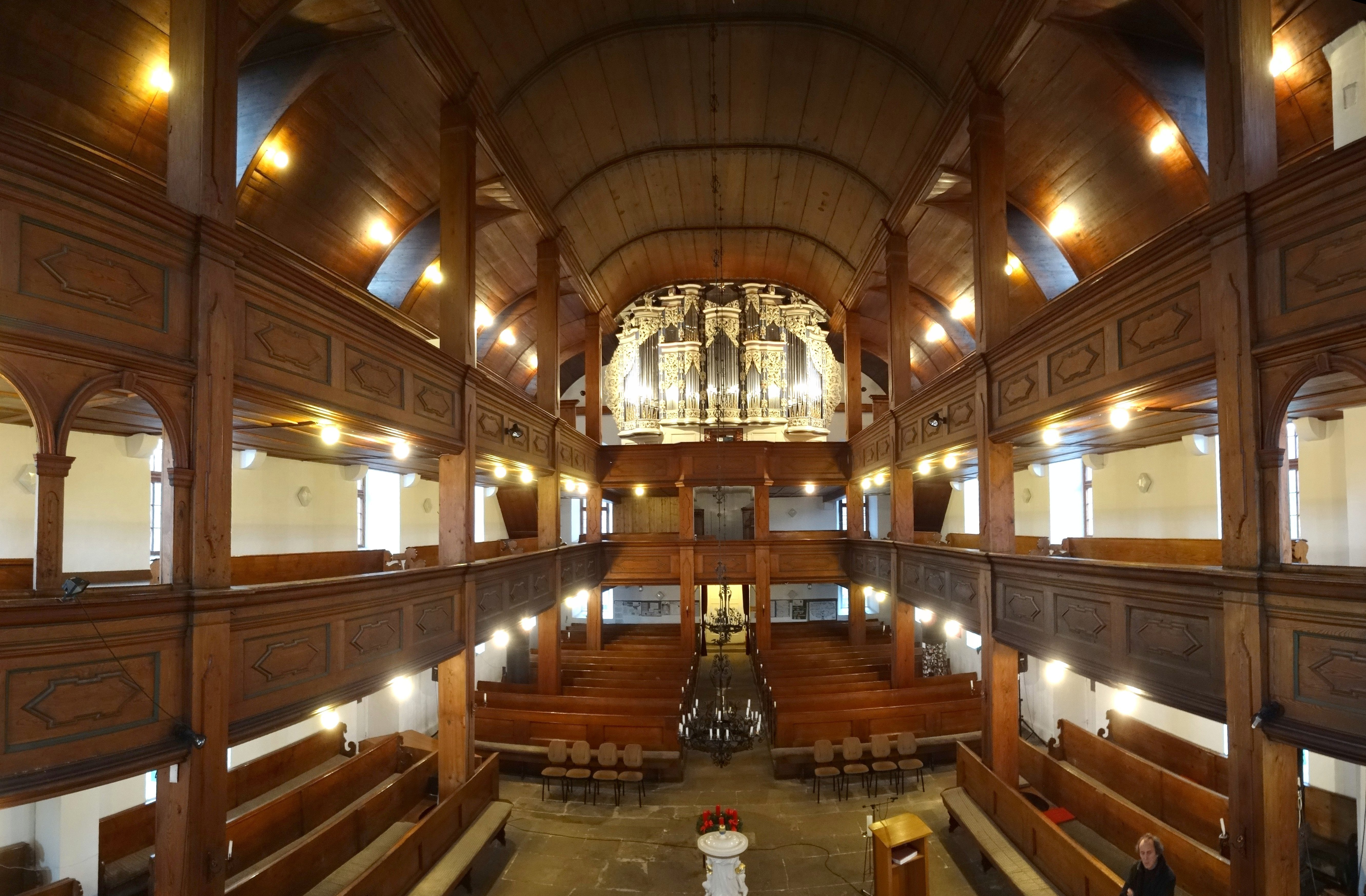 Innenraum Panorama St. Laurentius Gräfenroda